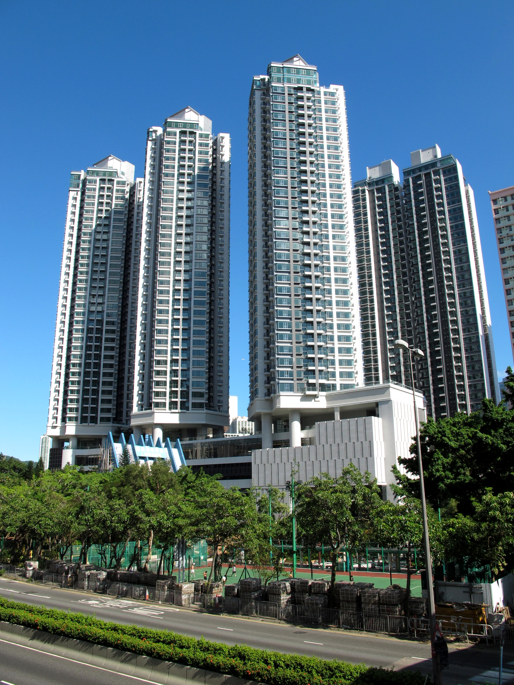 Lion Rise 現崇山